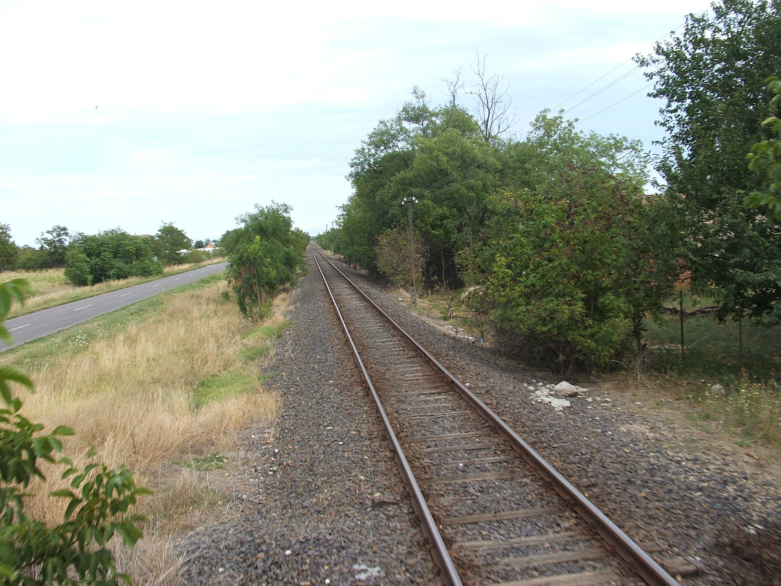 Vasútvonal Szentes és Orosháza között Dónát megállóhely közelében.